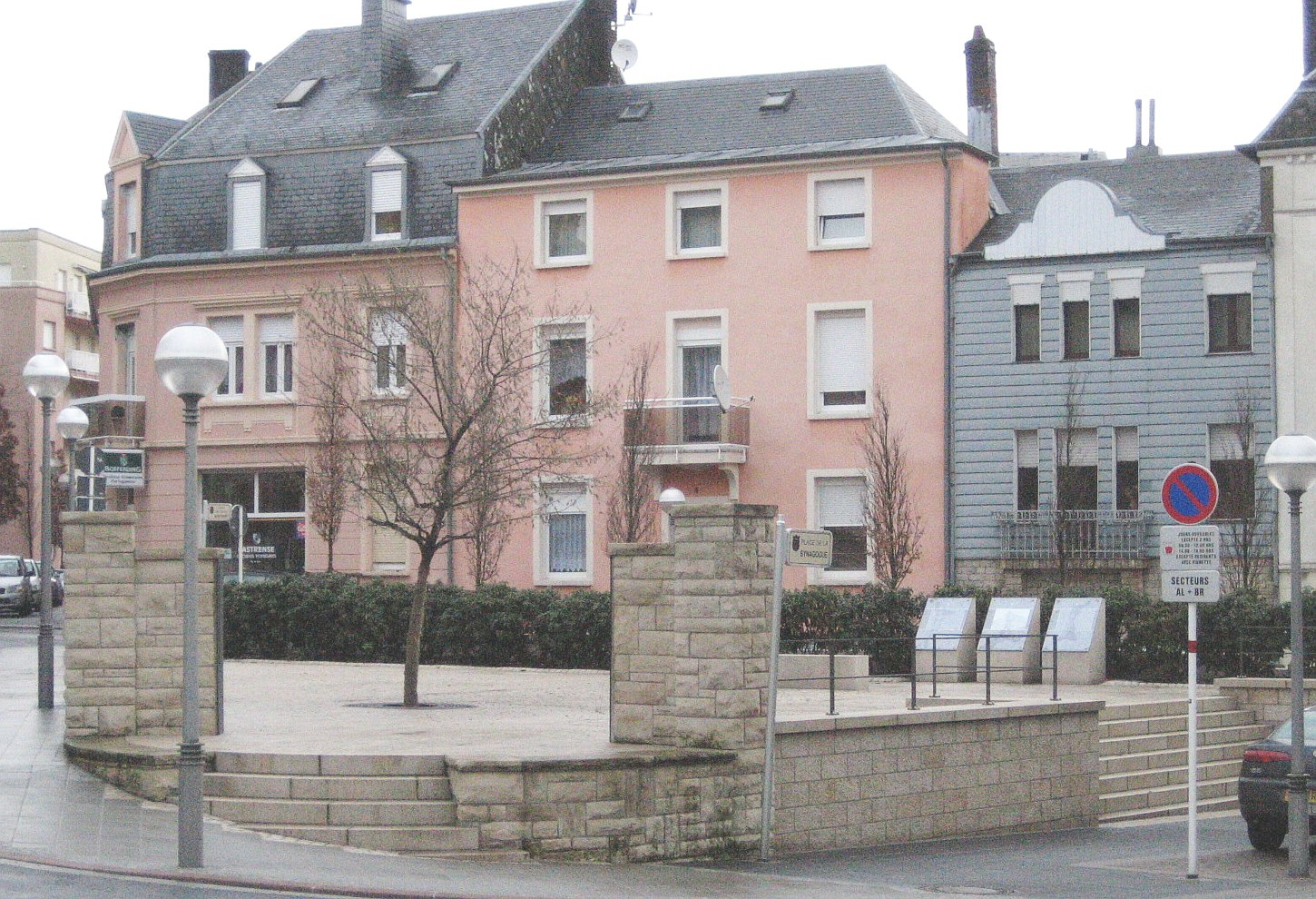 'Lëtzebuergesch: D' 'Place de la Synagogue zu Esch-Uelzecht. Februar 2006.